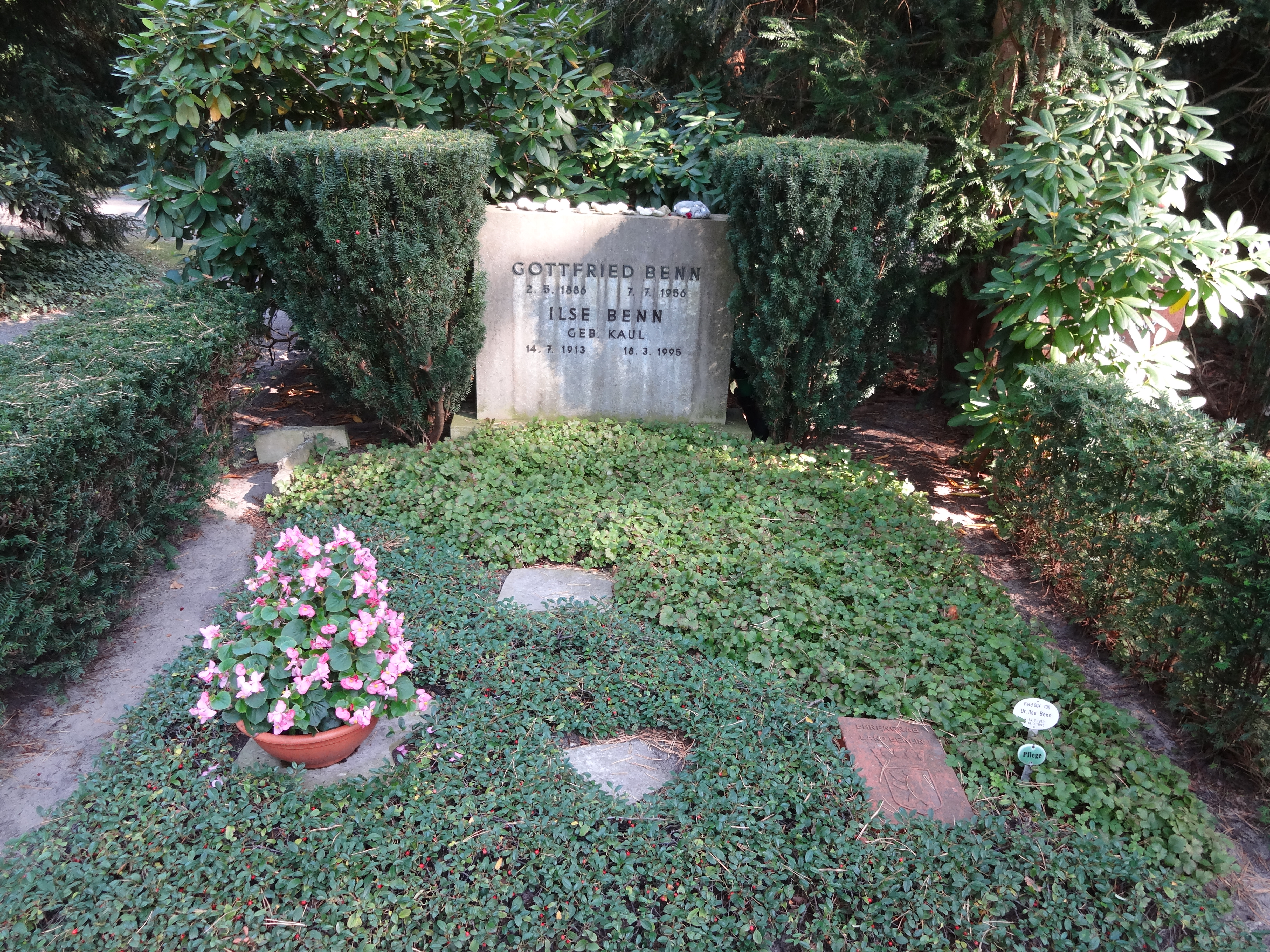 Ehrengrab für Benn, Gottfried auf dem Waldfriedhof Dahlem; der Friedhof ist ein Gartendenkmal in BerlinThis is a photograph of an architectural monument.